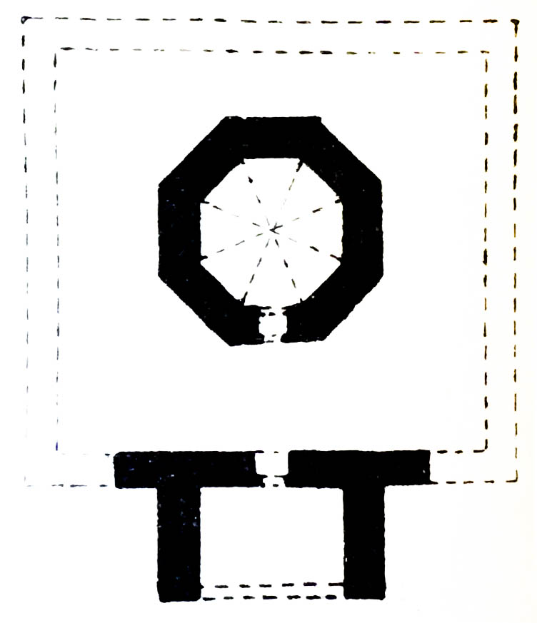 Kələxana türbələrindən qərb türbəsinin planı